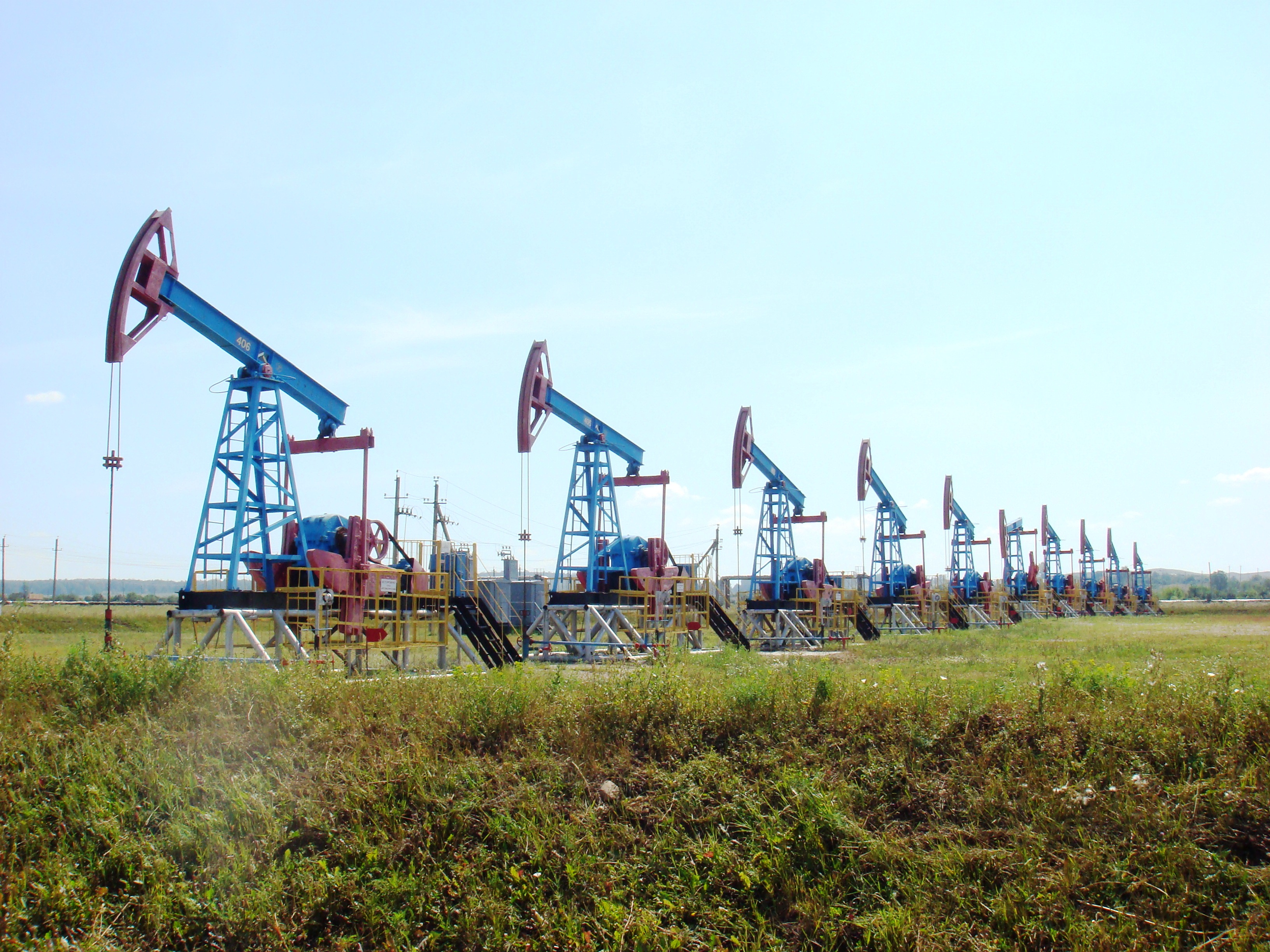 Cтанки-качалки близ микрорайона Перегонного (Ишимбай) напротив скважины № 702. Принадлежат НГДУ «Ишимбайнефть», входящего в структуру ПАО «АНК „Башнефть“».